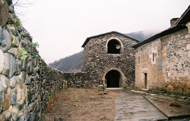 უბისა